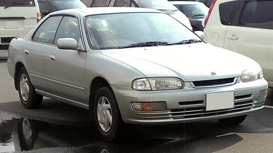 日産・プレセア（2代目）